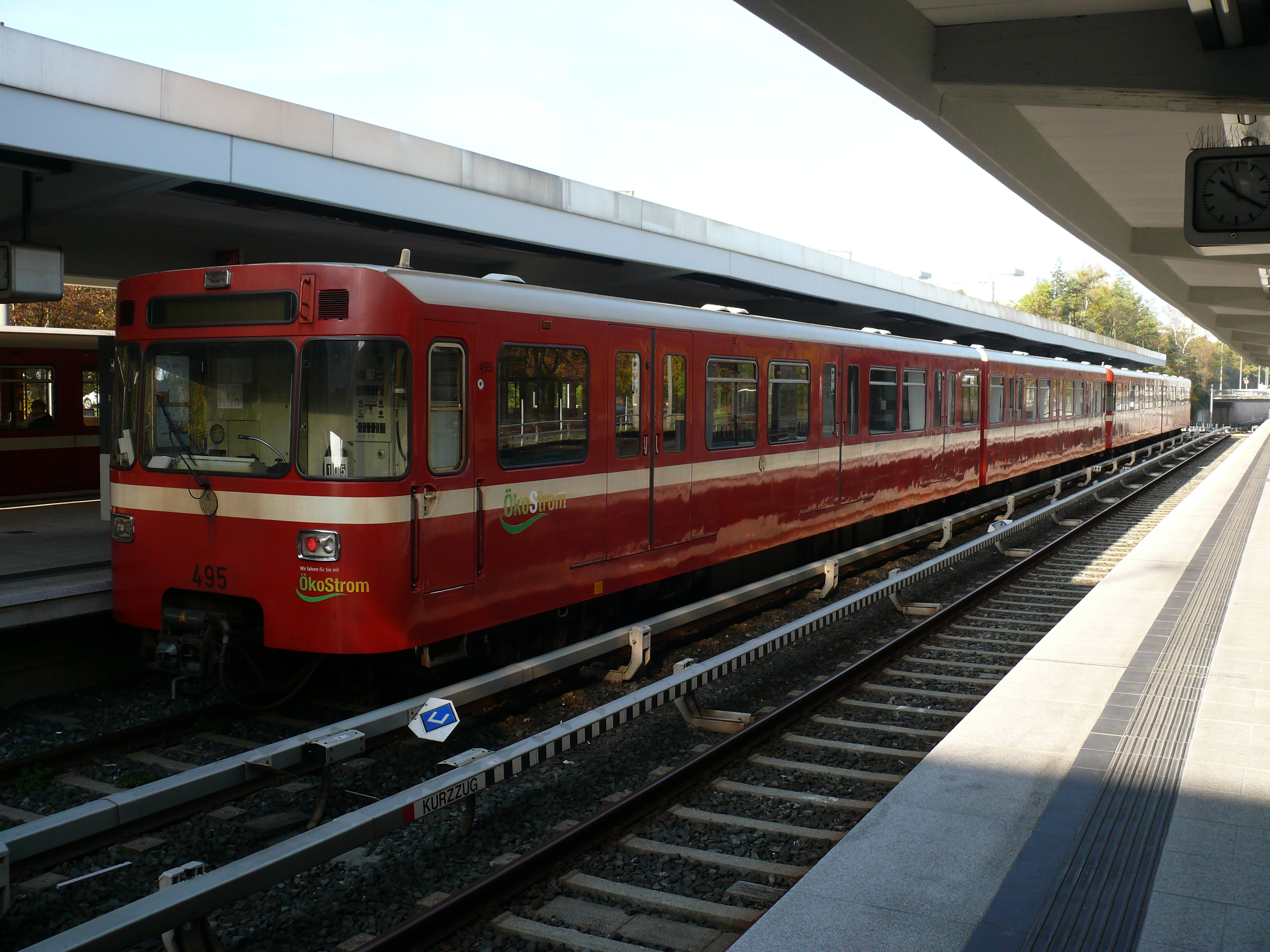 U-Bahnzug vom Typ DT1 auf dem Bahnsteig Richtung Langwasser-Süd am U-Bahnhof Scharfreiterring in Nürnberg.